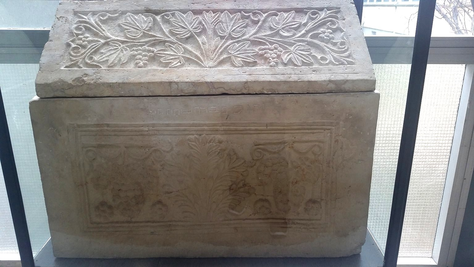 גלוסקמה בעלת מכסה גמלוני מהר הצופים בירושלים מתוארכת למאה הראשונה - שנייה לספירה מאבן גיר קשה. על הגלוסקמה נמצאת הכתובת: יהוסף בן חנניה הסופר אוסף החוג לארכאולוגיה אוניברסיטת חיפה